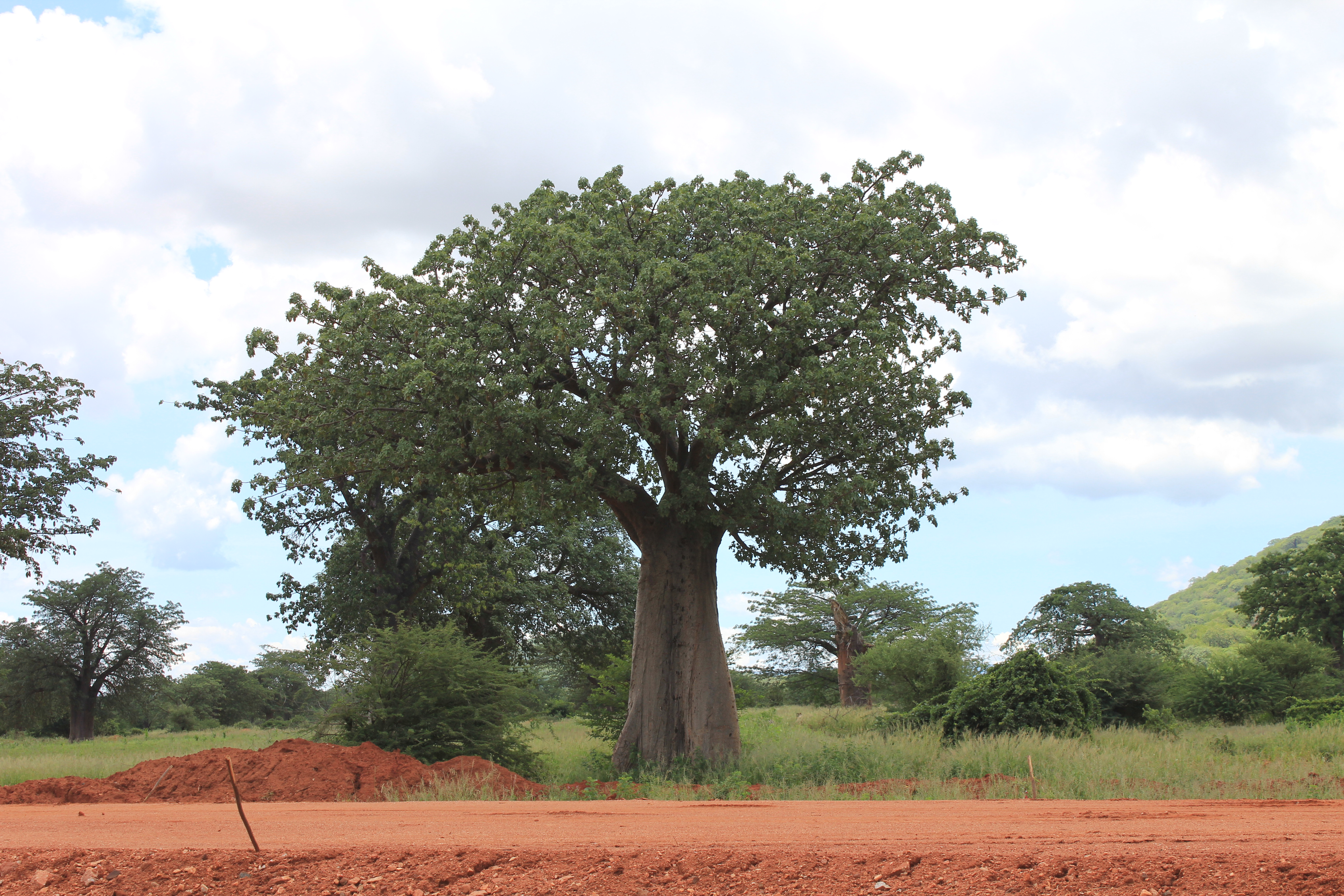 Dodoma, Tanzania